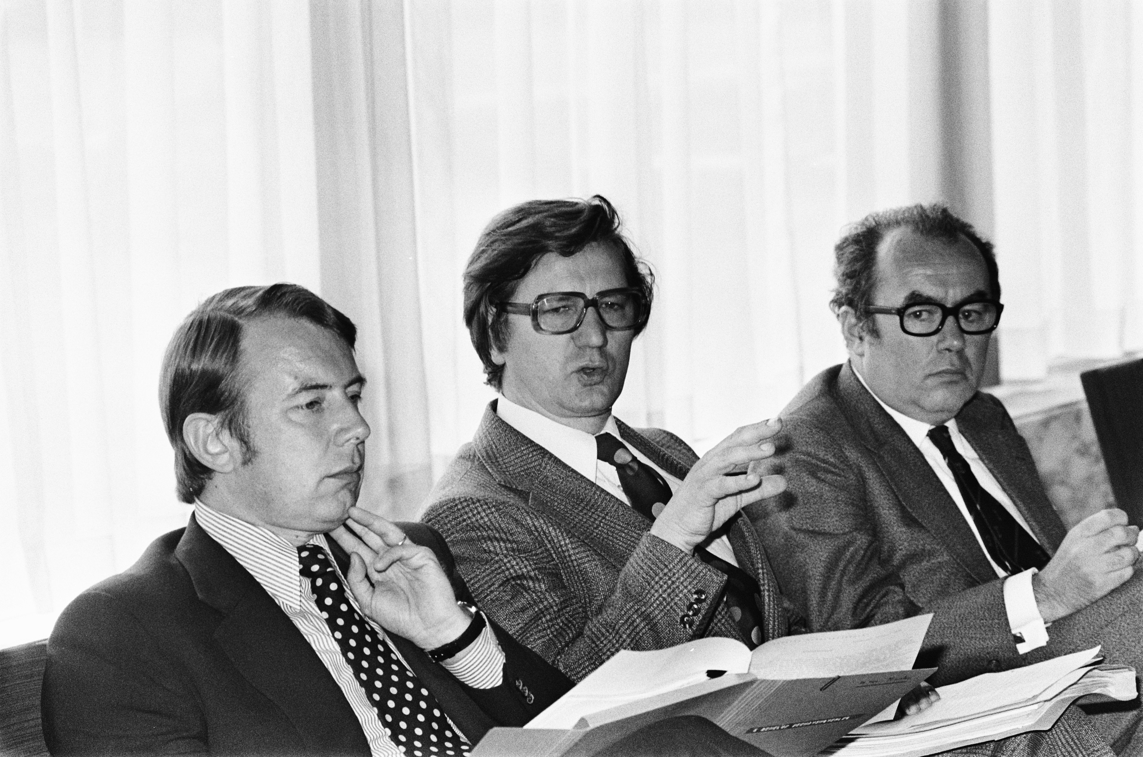 Collectie / Archief : Fotocollectie Anefo Reportage / Serie : [ onbekend ] Beschrijving : Persconferentie na Benelux-zeehavenoverleg in Rotterdam; v.l.n.r. minister Chabert , minister Westerterp , minister Refrainge Datum : 22 april 1975 Locatie : Rotterdam, Zuid-Holland Trefwoorden : persconferenties Persoonsnaam : Westerterp, Tjerk Fotograaf : Mieremet, Rob / Anefo Auteursrechthebbende : Nationaal Archief Materiaalsoort : Negatief (zwart/wit) Nummer archiefinventaris : bekijk toegang 2.24.01.05 Bestanddeelnummer : 927-8860